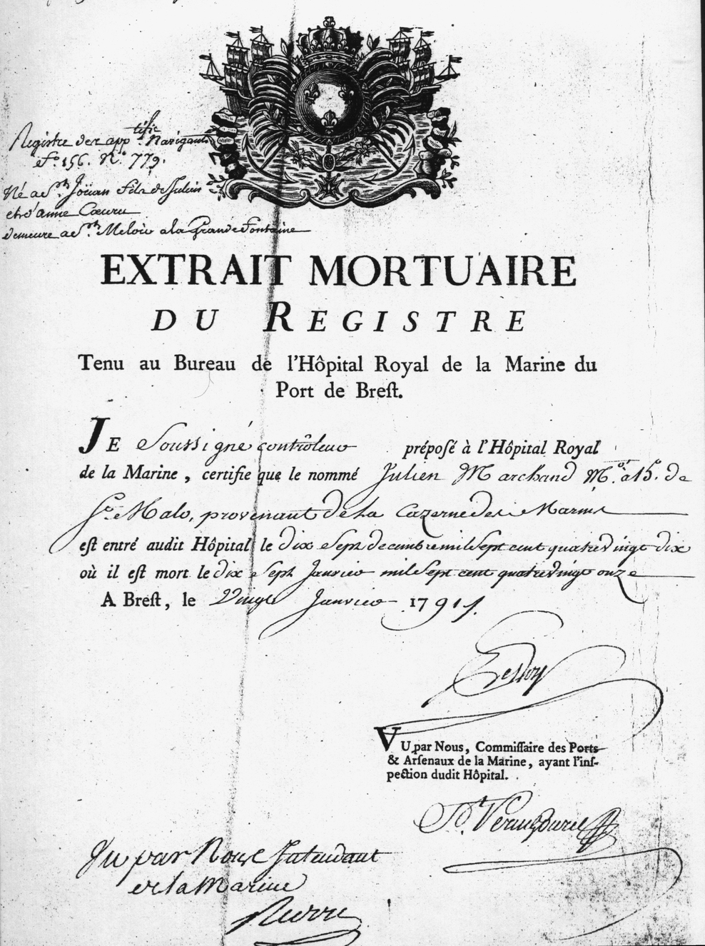 Extrait du registre de l'hôpital royal de Brest où est mort un matelot de Saint-Malo le 17 janvier 1791. (cote 4 S 136).